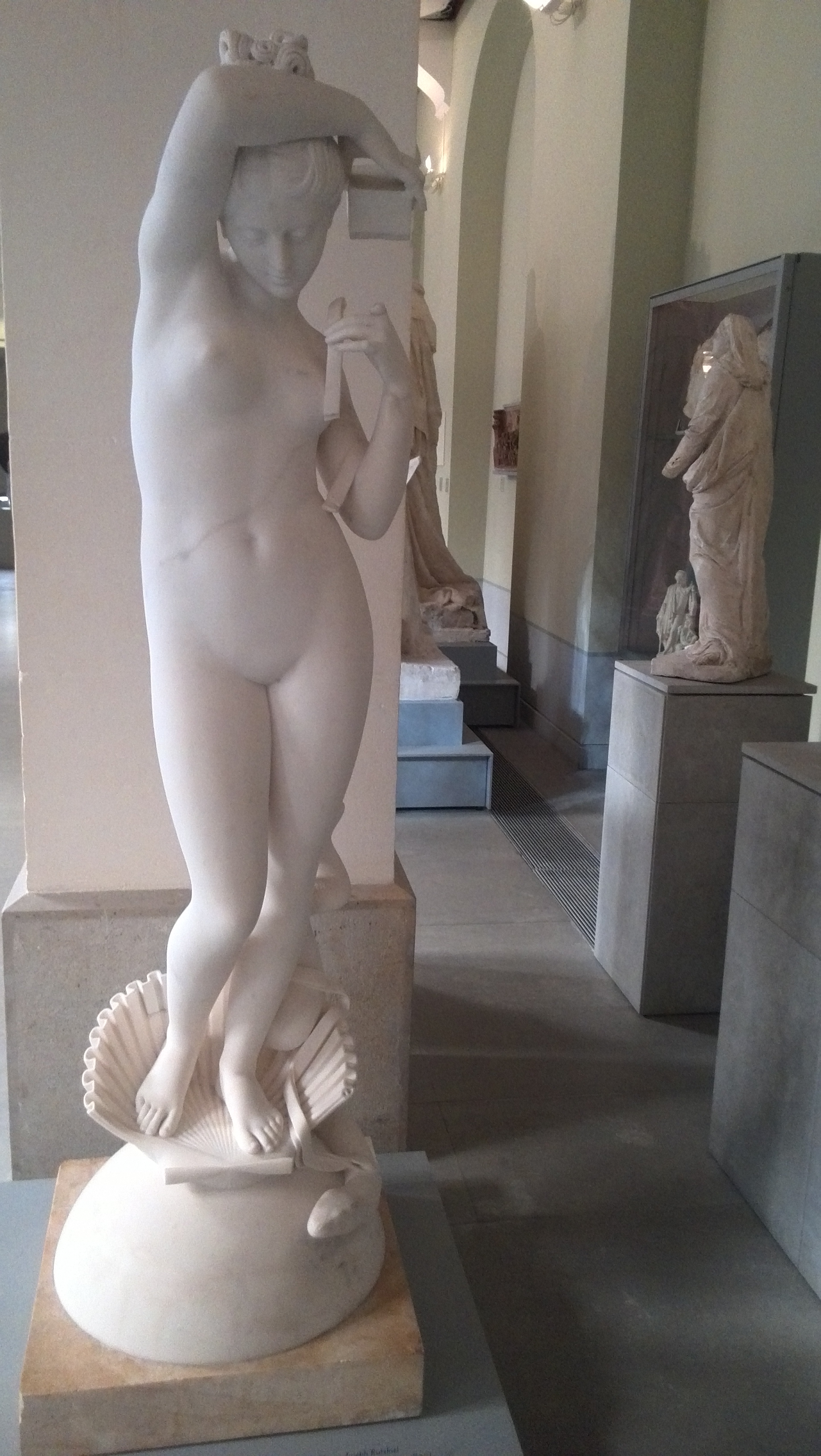 "Pandore", Henri-Joseph Rutxhiel (1819), photographiée au Musée Granet d'Aix-en-Provence. Prêt du Musée du Louvre.